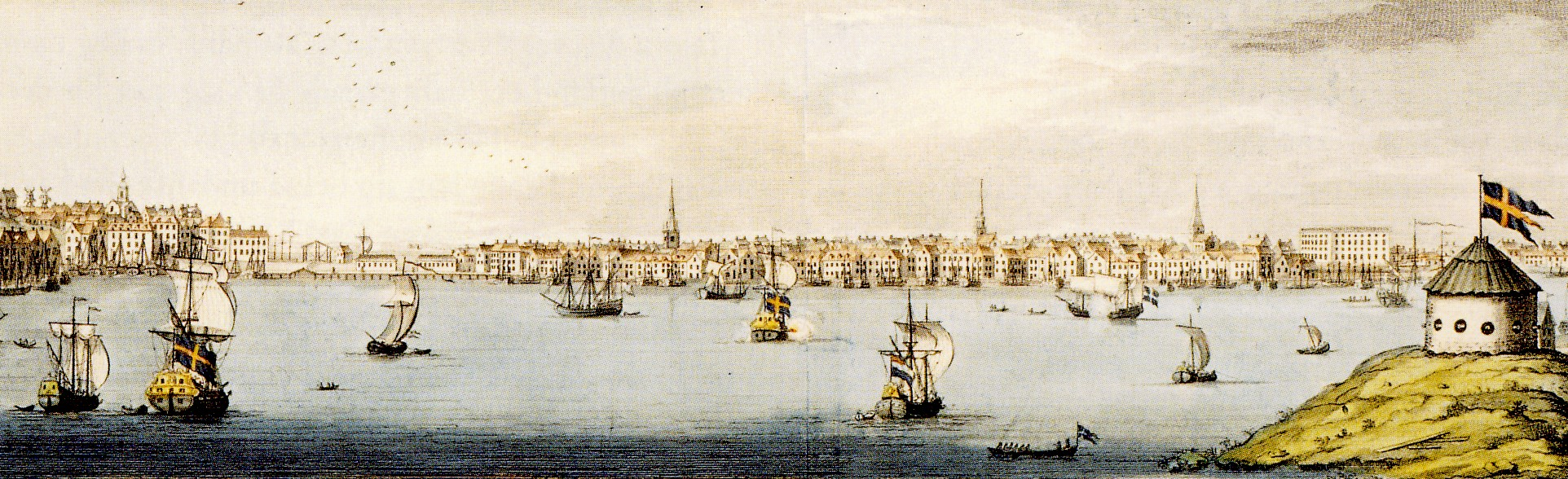 Vy mot Gamla stan och Skeppsbron från Kastellholmen